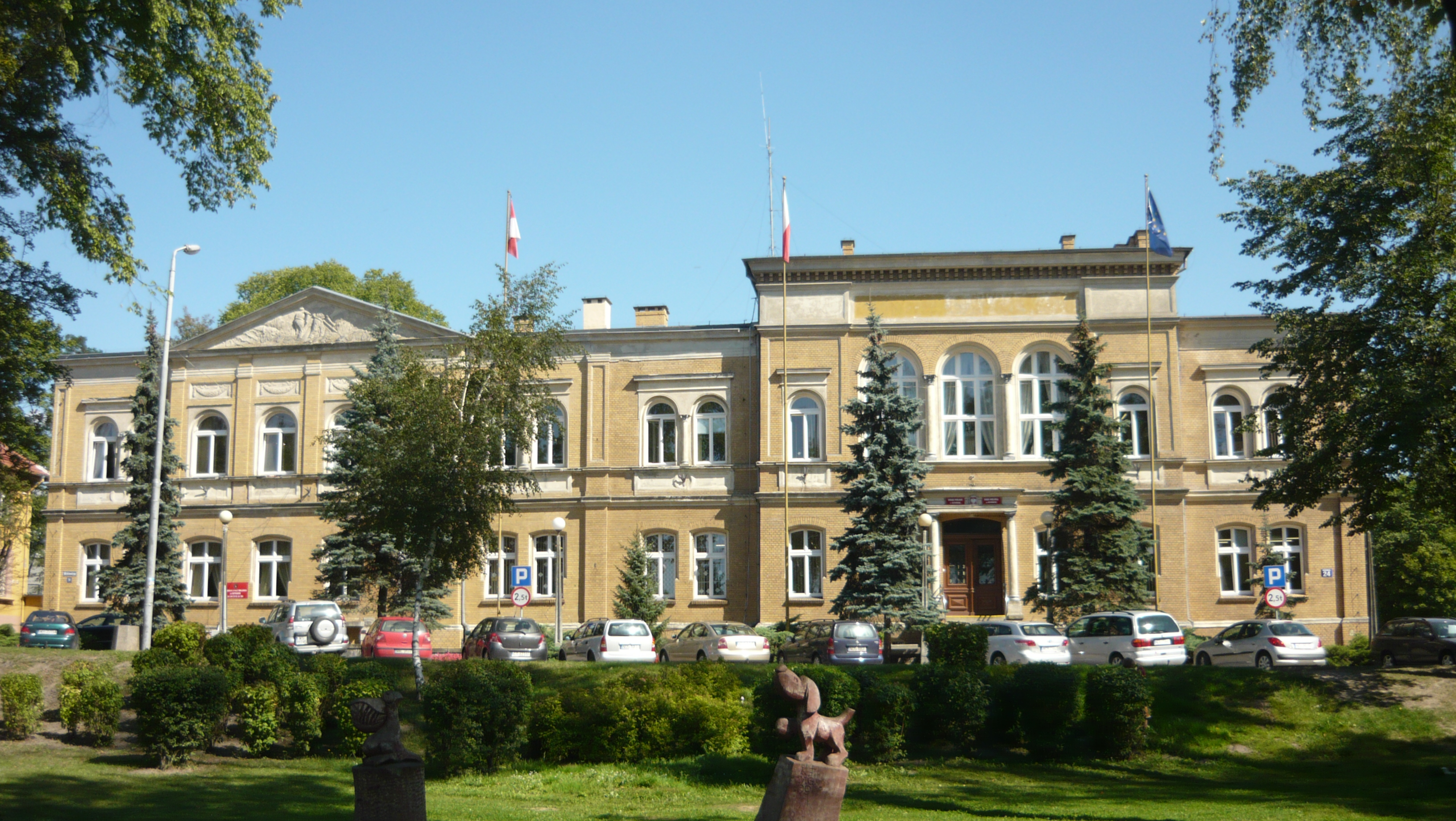 Ostróda, ul. Mickiewicza 24 - Urząd Miasta, Urząd Stanu Cywilnego, Straż Miejska (zabytek nr A-2099 z 14.08.1987 i A-3799 z 14.08.1987)